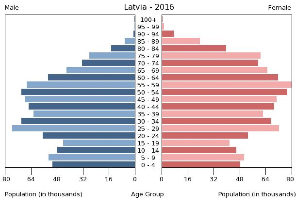 A population pyramid illustrates the age and sex structure of a country's population and may provide insights about political and social stability, as well as economic development. The population is distributed along the horizontal axis, with males shown on the left and females on the right. The male and female populations are broken down into 5-year age groups represented as horizontal bars along the vertical axis, with the youngest age groups at the bottom and the oldest at the top. The shape of the population pyramid gradually evolves over time based on fertility, mortality, and international migration trends.